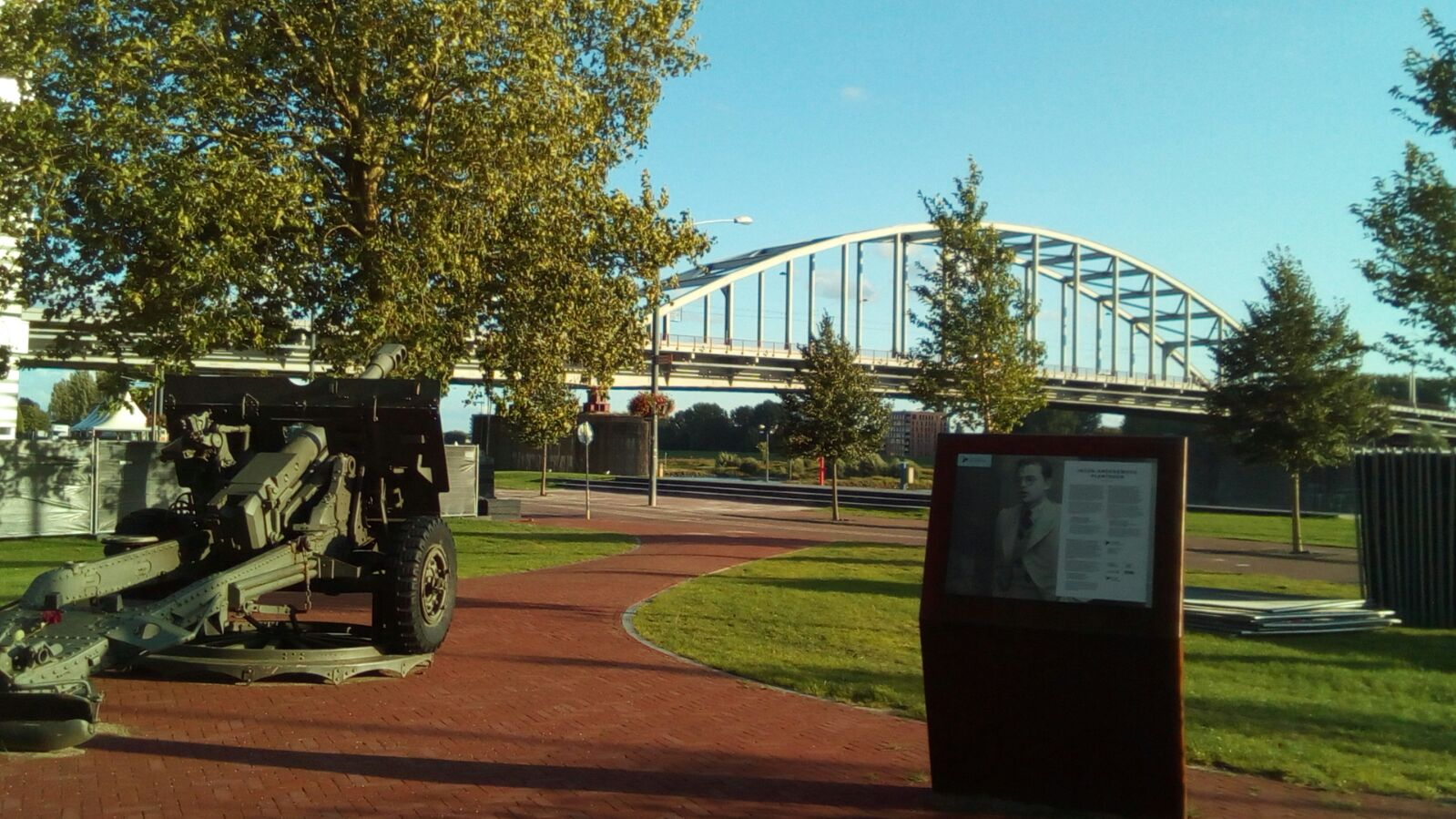 Airborne Memorial en John Frostbrug in Arnhem. Gemaakt september 2017.